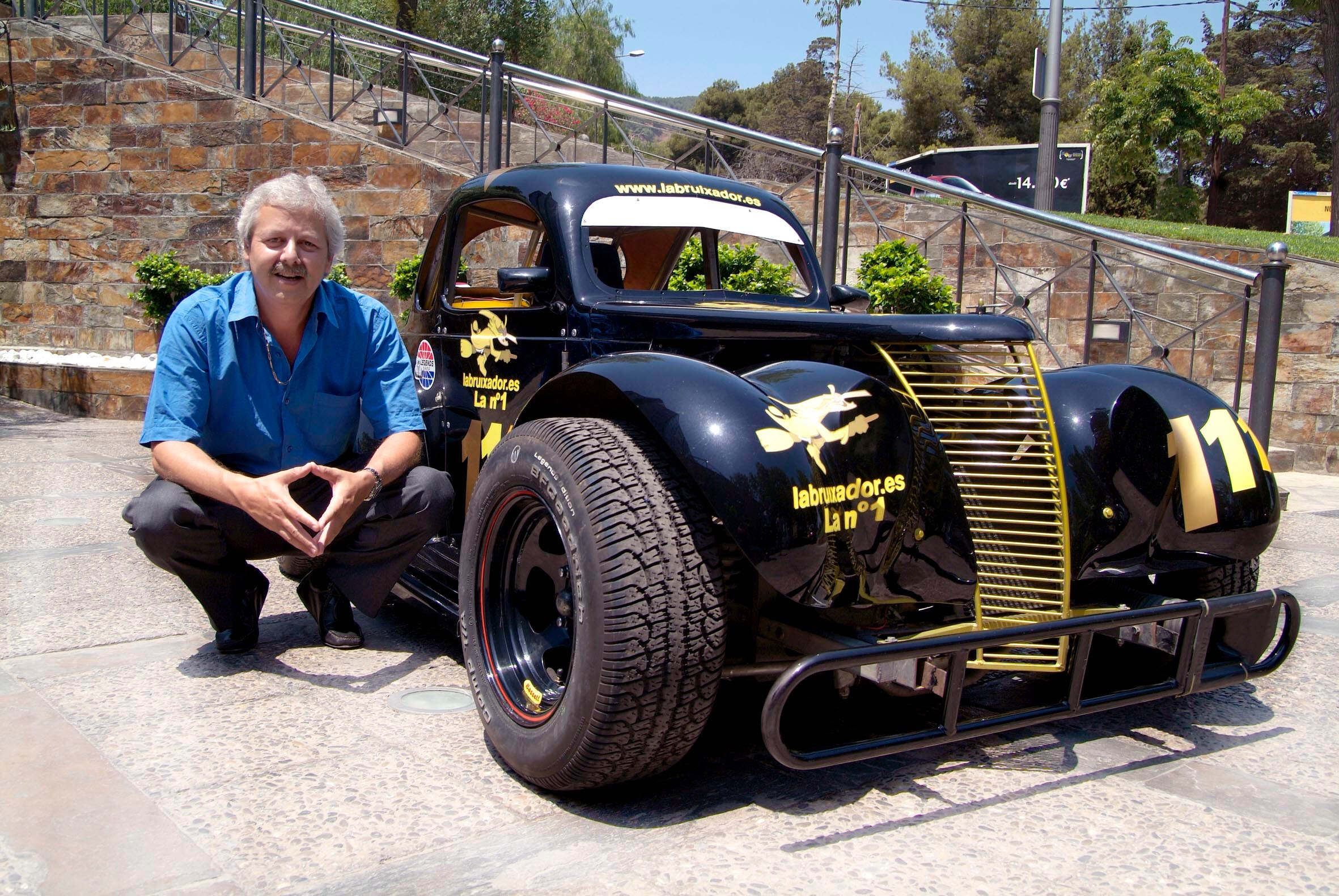 Nascar Xavier Gabriel